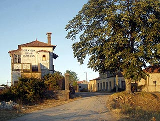 Estación de ferrocarril en Duas Igrejas, donde concluía la línea Pocinho-Miranda do Douro. Esta imagen fue realizada por Eugenio Vega [colaborador de Wikipedia] en agosto de 2005. Está libre de derechos.